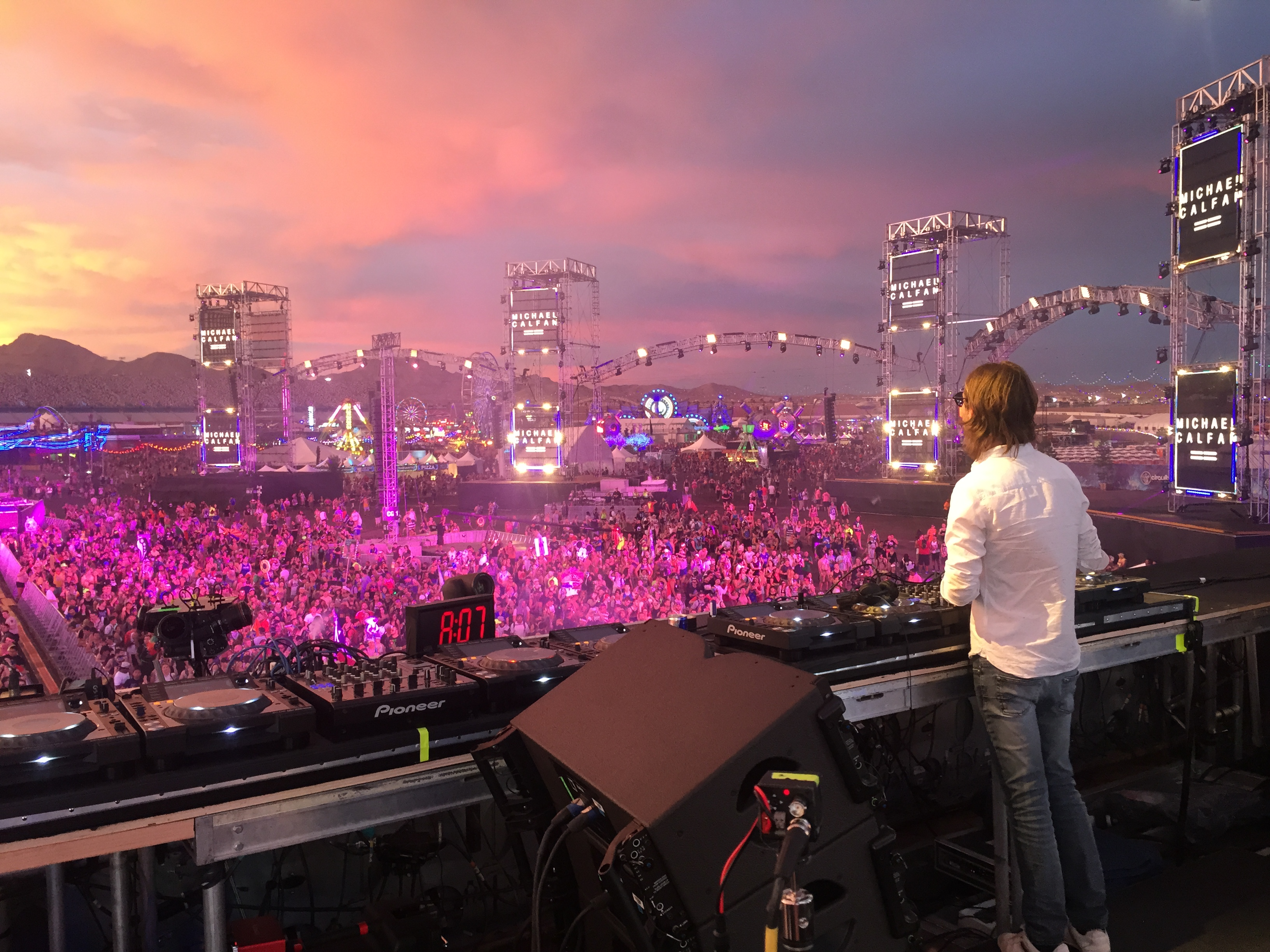 Michael Calfan - EDC Las Vegas 2016